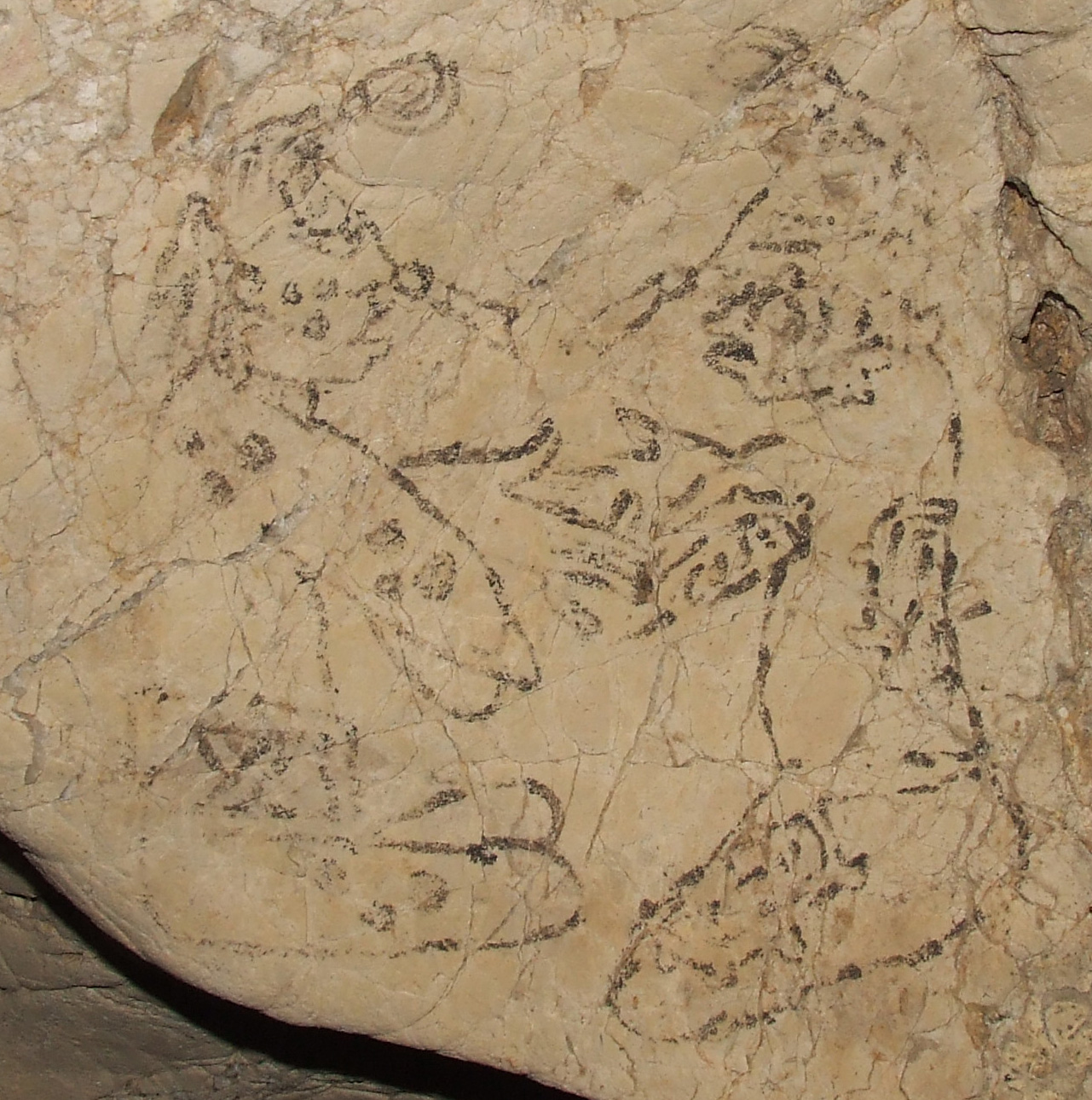 Pintura 87 de la Cueva de Naj Tunich, Guatemala